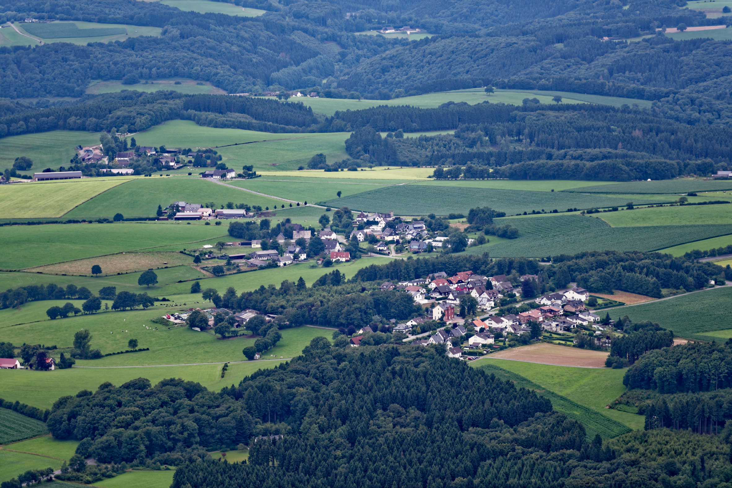 Breckerfelder Ortsteil Branten, dahinter Altenbreckerfeld, dahinter Funkenhof, dahinter Schlagbaum, dahinter Wittenstein und Kückelhausen, dahinter das Tal der Ennepe; links angeschnitten Boßel